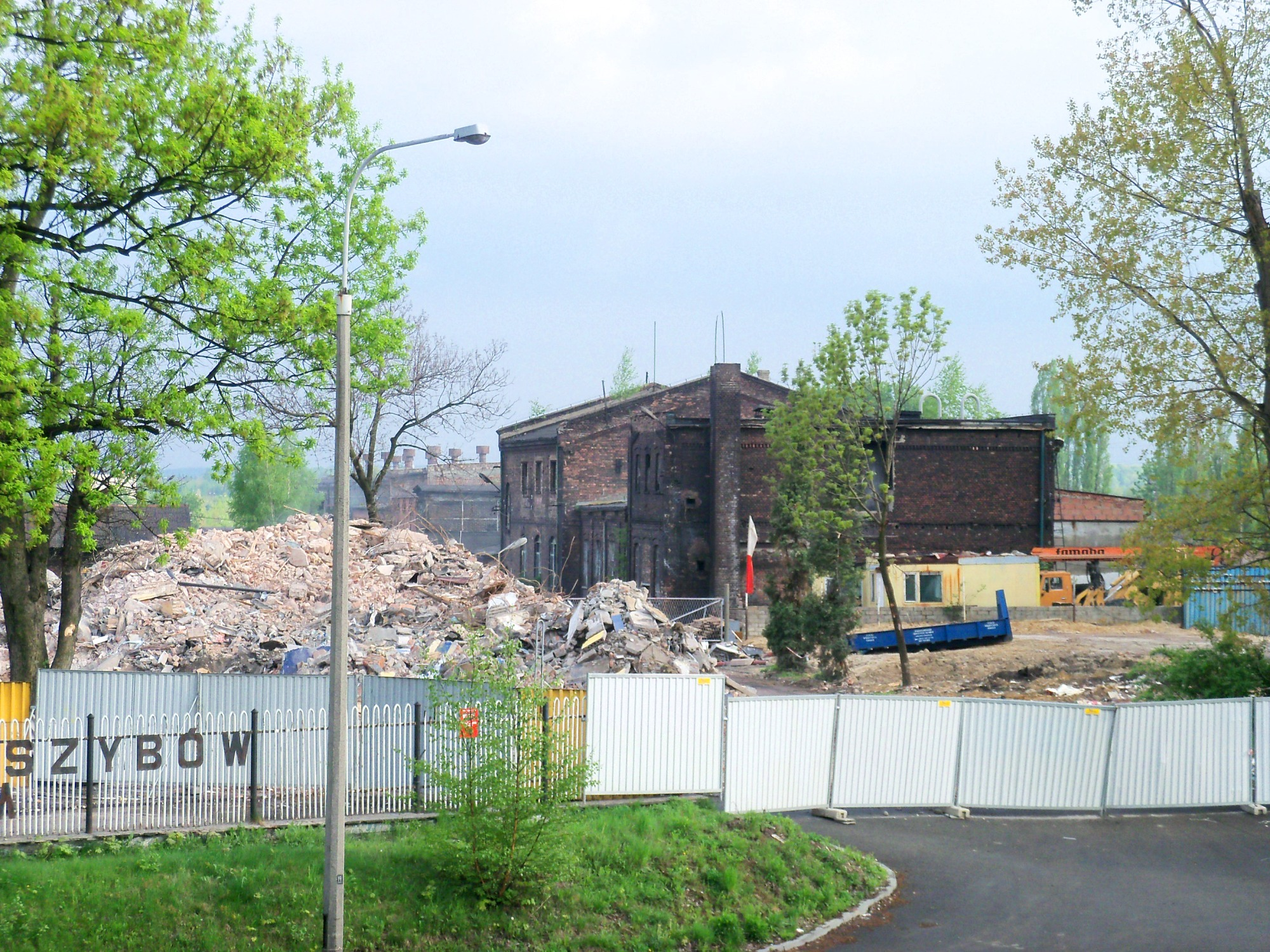 Budynki-pozostałości po dawnej kopalni "Jerzy" w Katowicach-Dąbrówce Małej (działka przy al. W. Roździeńskiego 214). Część budynków w trakcie rozbiórki.